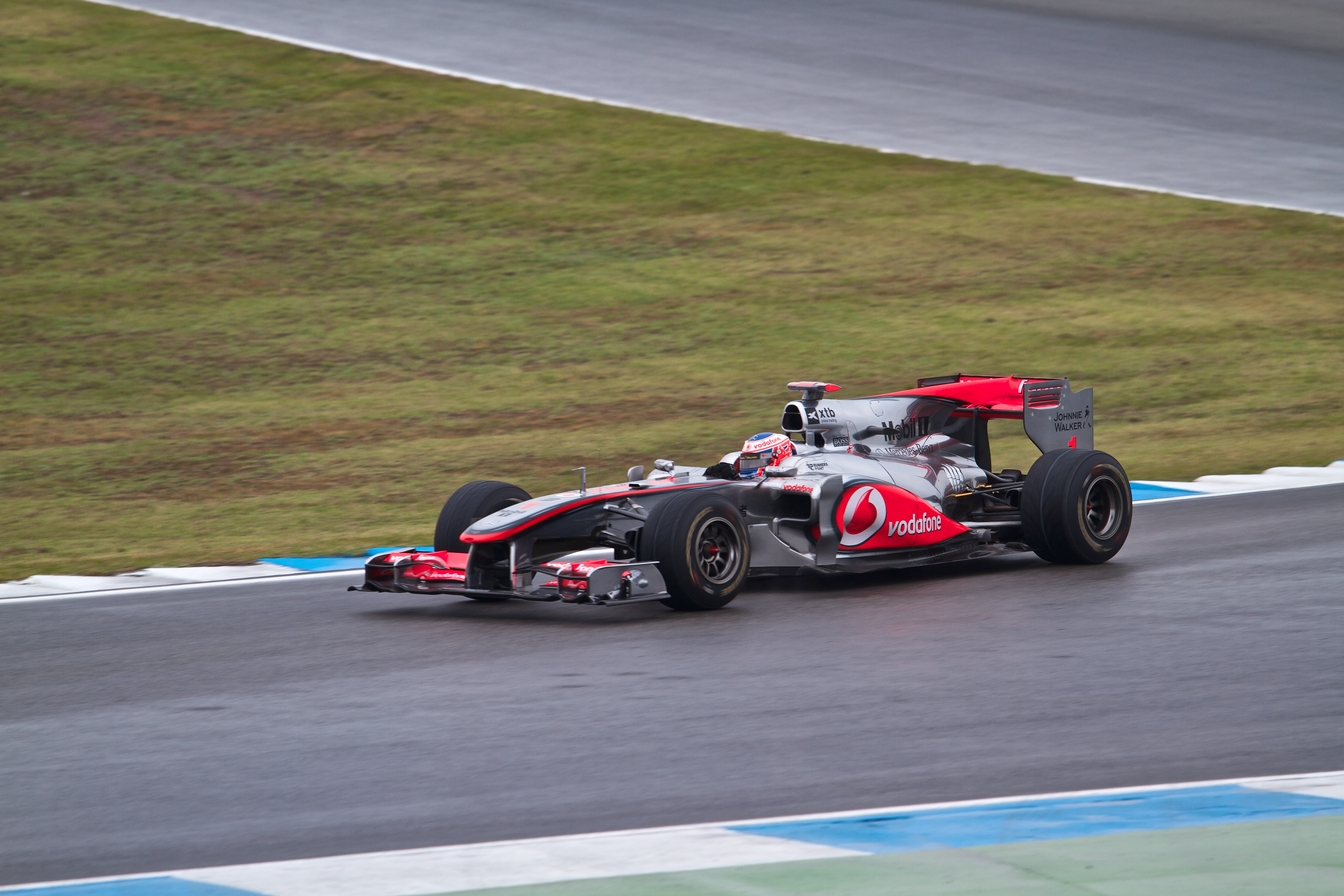 Jenson Button à Hockenheim en 2010